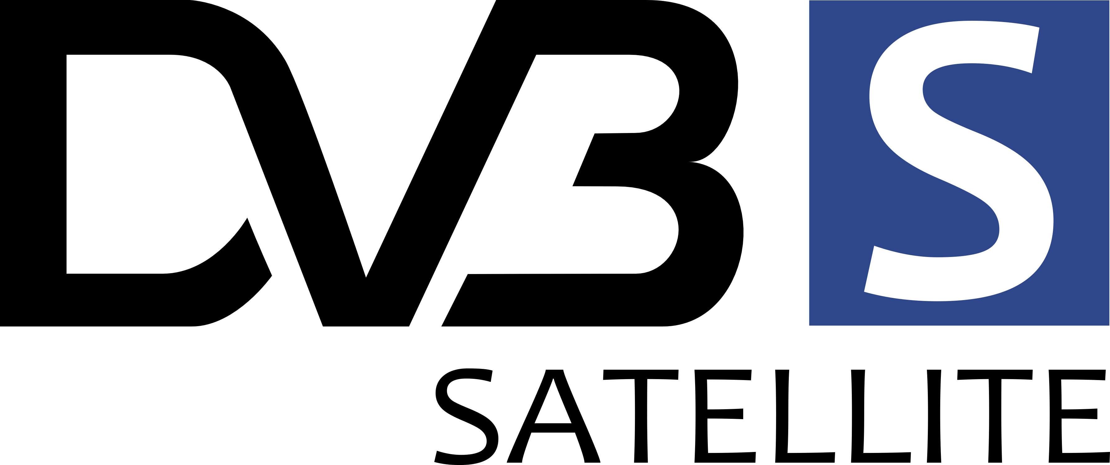 DVBS-Logo